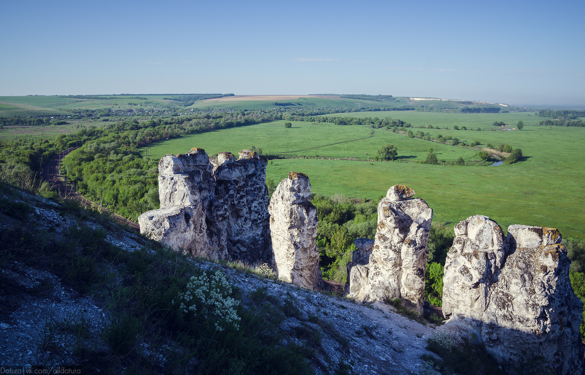 Дивногорье заповедник: У ж/д станци Копанище, слева от дороги, 300 м. не доезжая х. Дивногорье,Дивногорье,Лискинский район, Воронежская область This image is related to the protected area of Russia number 3600108